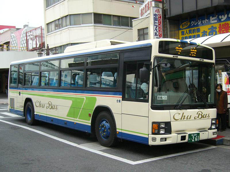 登録番号 福山200か・261 中国バス所属 しまなみライナー号用 2007年2月26日 福山駅前にて撮影